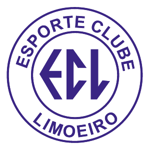 Logo: Esporte Clube Limoeiro, Limoeiro do Norte (CE), Brazil.